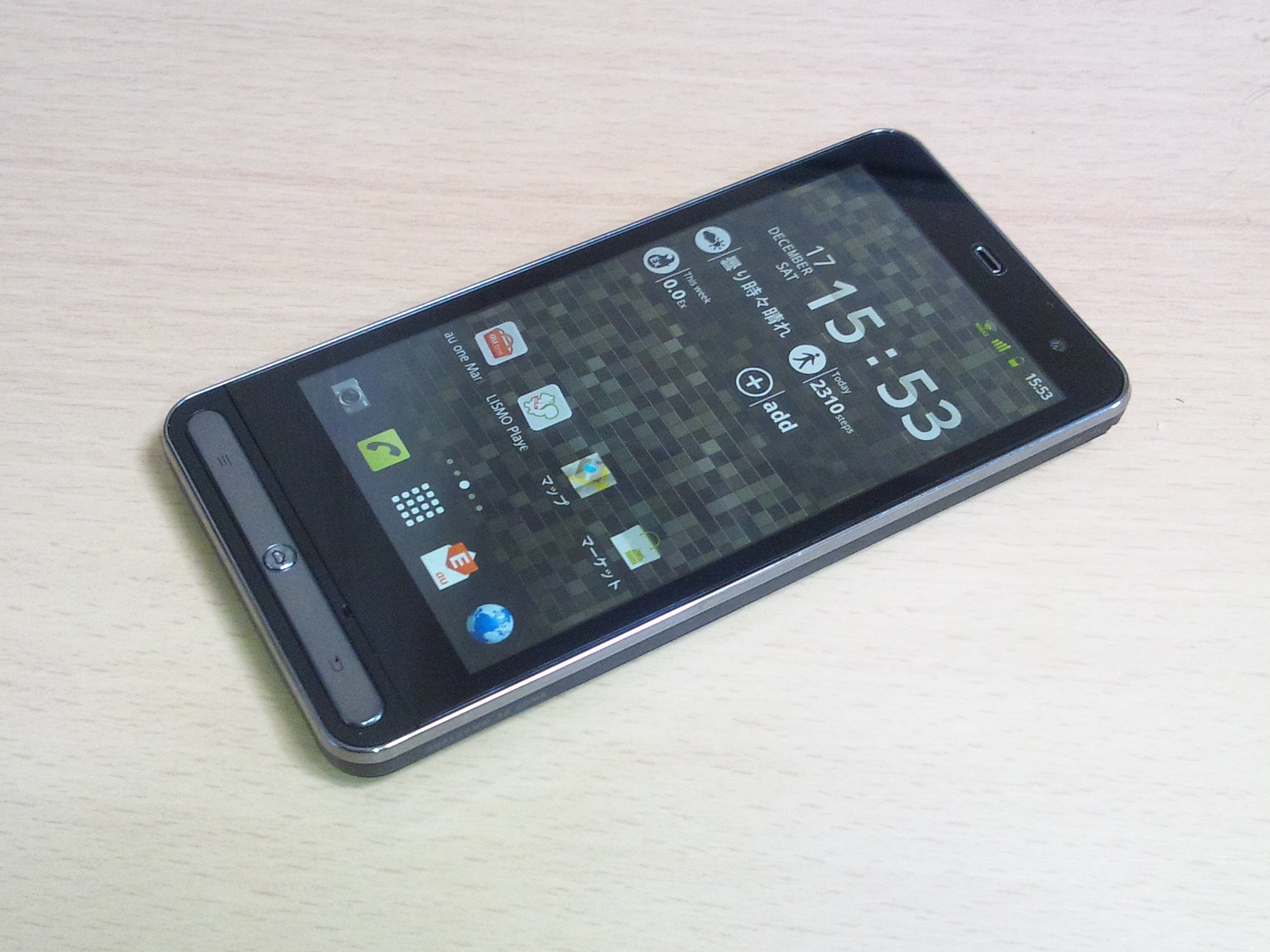 ISW11F 表側